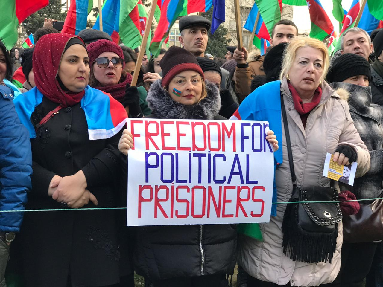 19 yanvar mitinqi